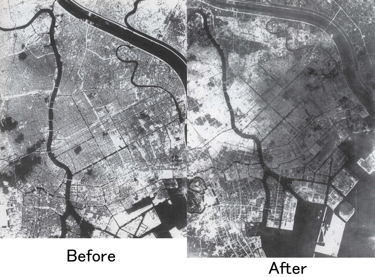 空襲を受ける前後の東京の比較